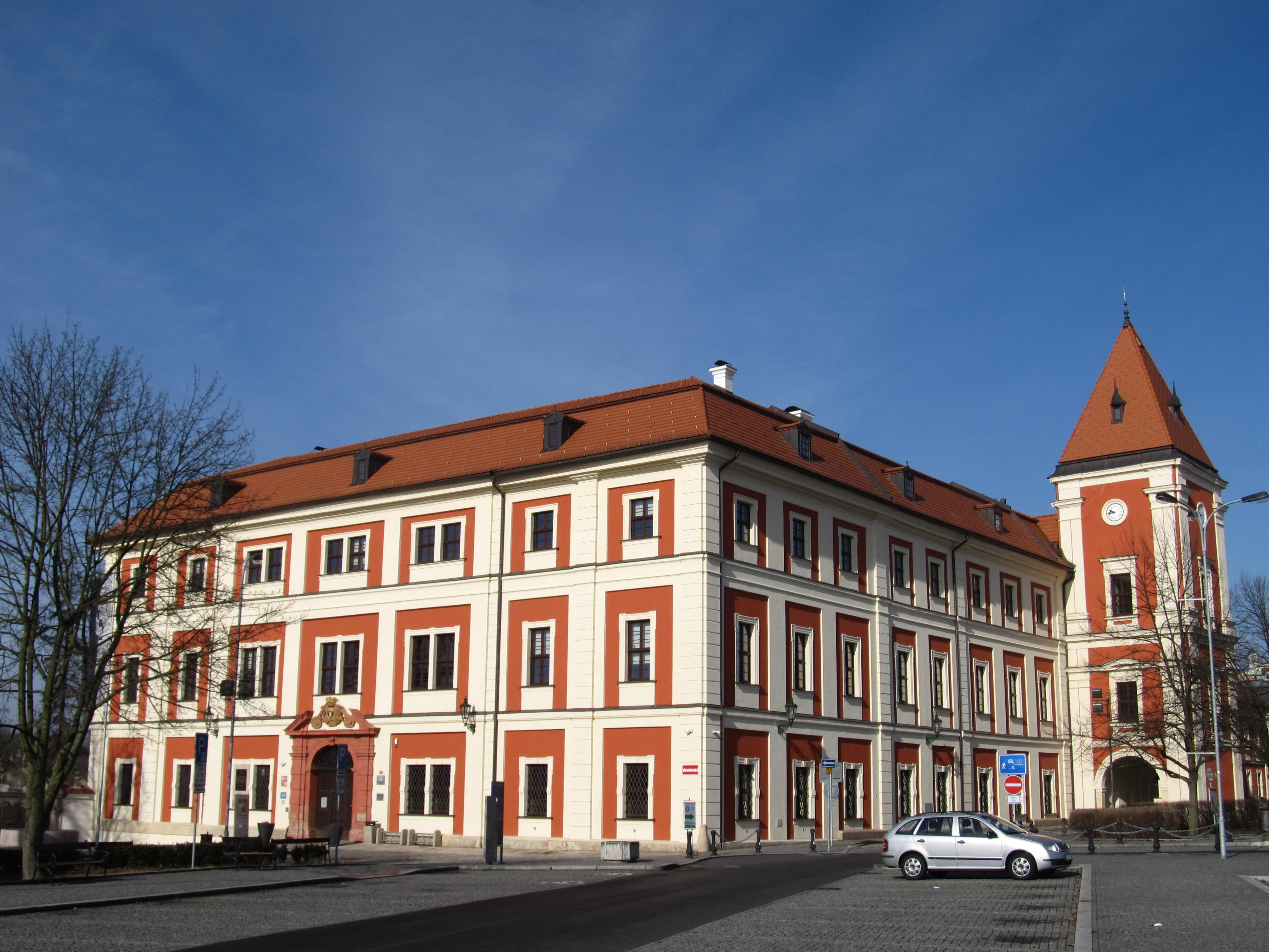 Pohled na zámek z Jáchymovské ulice